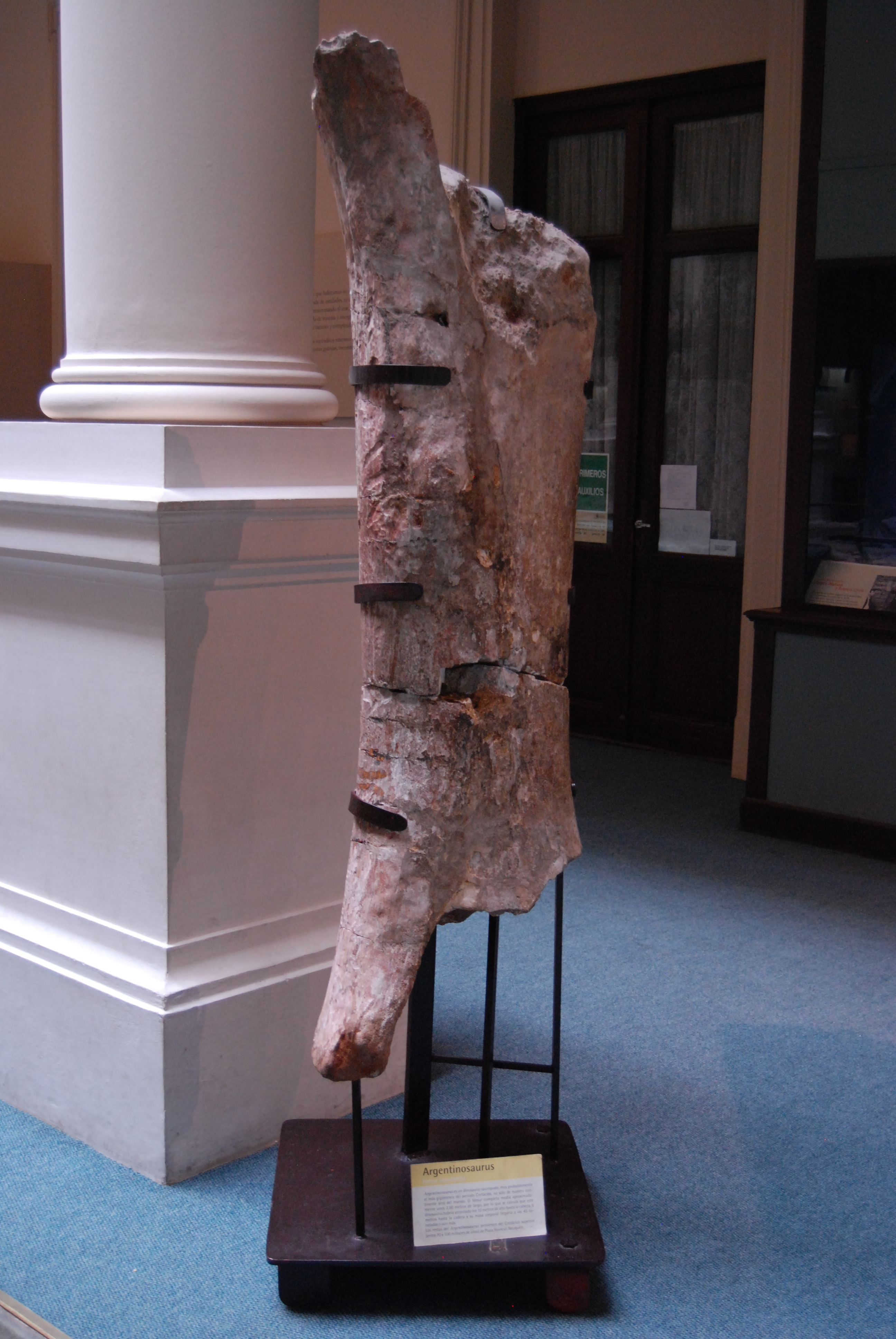 Argentinosaurus Femur incompleto. Argentinosaurus es un dinosauro saurópodo, muy probablemente el más gigantesco del periodo Cretácico, no sólo de nuestro continente sino del mundo. El fémur completo medía aproximadamente unos 2,50 metros de largo, por lo que se calcula que este dinosaurio habria alcanzado los 10 metros de alto hasta la cabeza, 6 metros hasta la cadera y su masa corporal llegaría a las 45 toneladas o aún más. Los restos del Argentinosaurus provienen del Cretácio superior (entre 70 y 100 millones de años) de Plaza Huincul, Neuquén.